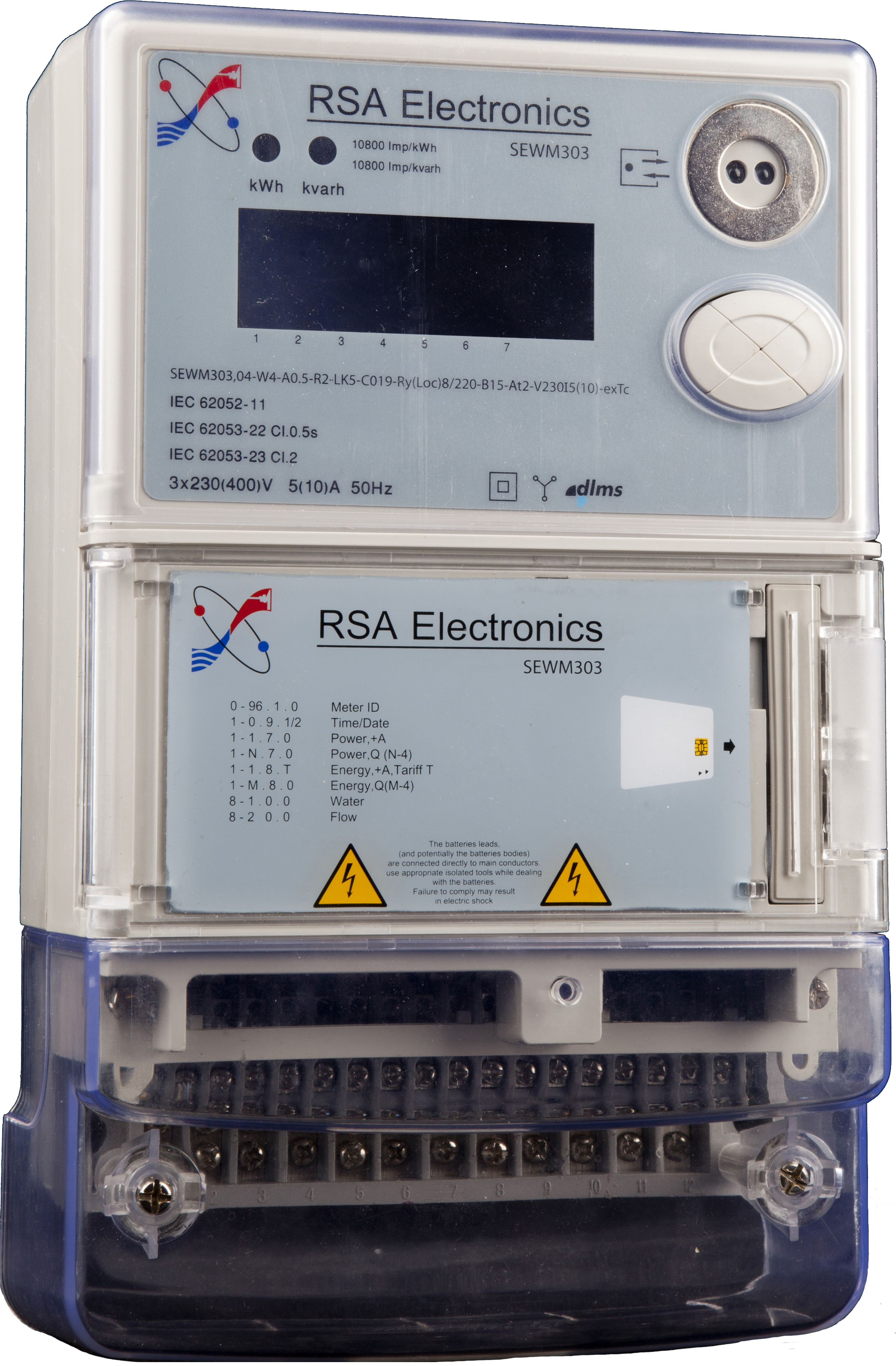 کنتور هوشمند آب و برق 303